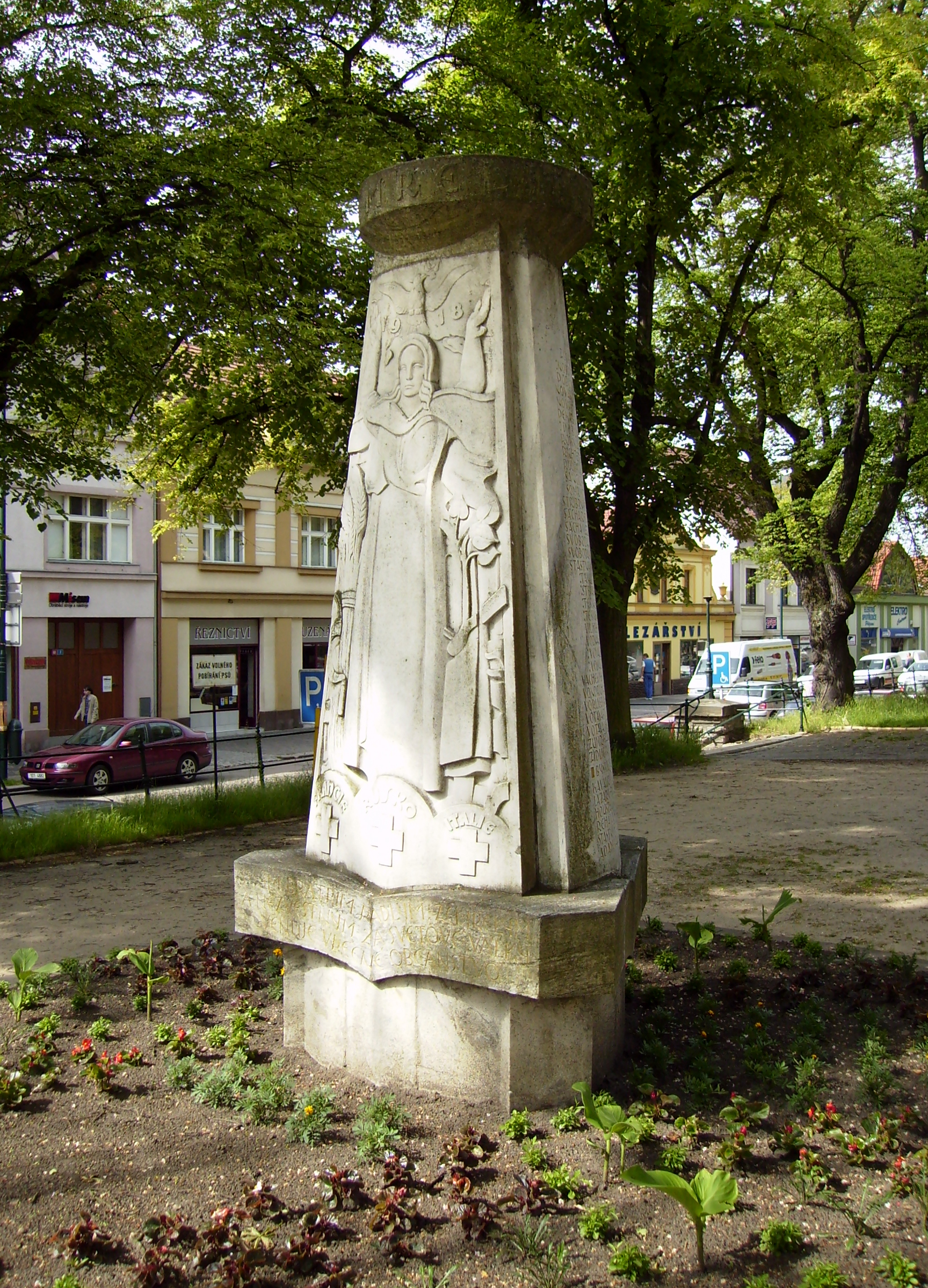 Legionářský pomník v městském parku v Lysé nad Labem.